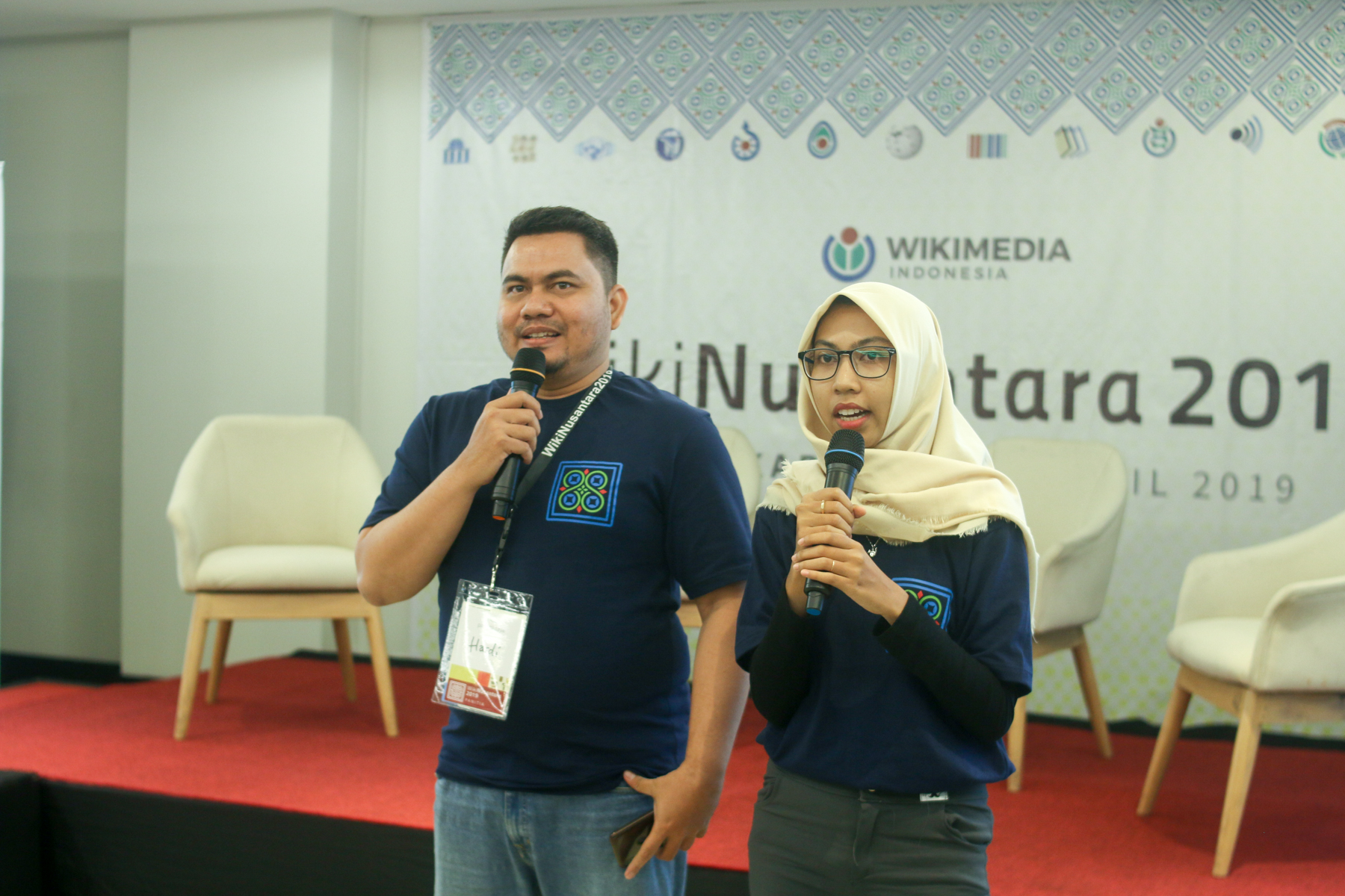 Dokumentasi foto dari WikiNusantara 2019 di Yogyakarta, 27–28 April 2019.